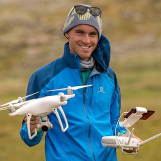 Arbeitsfoto